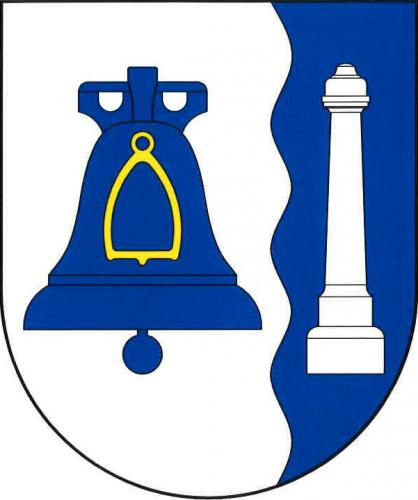 Velký Vřešťov znak